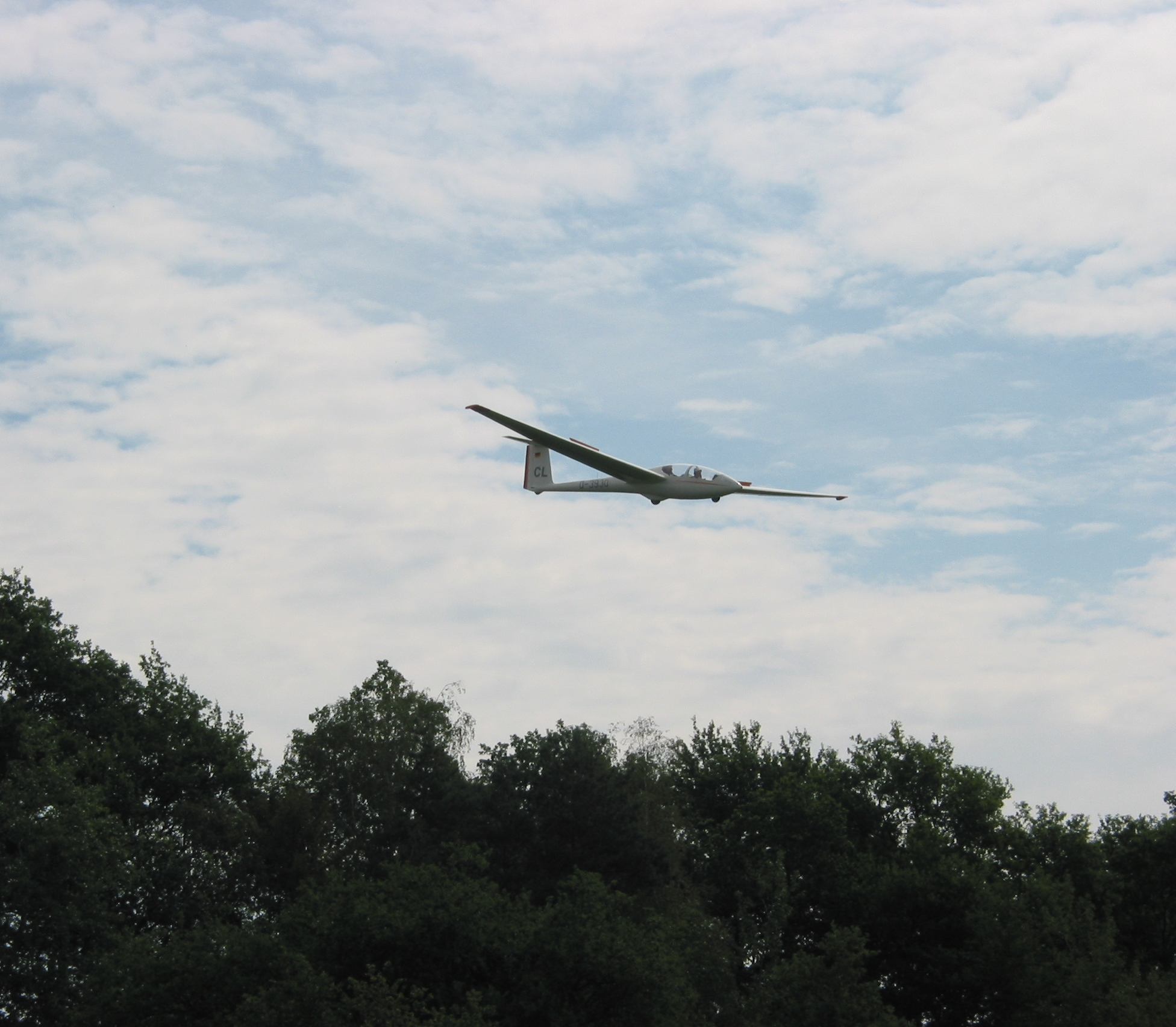 ASK 21 im Endanflug mit Klappen